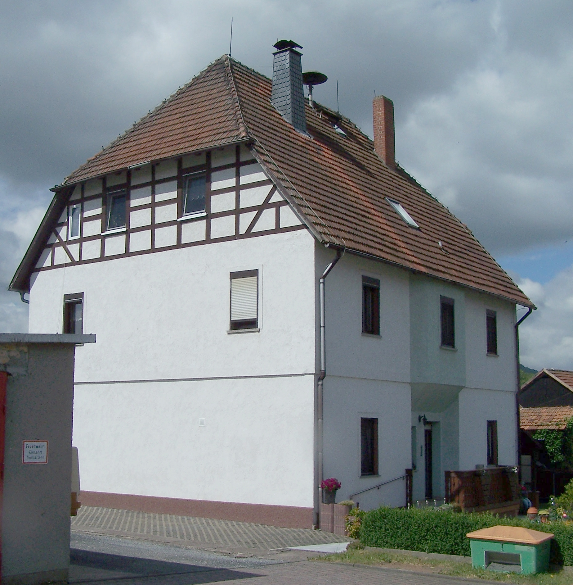 Ehemalige Schule in Martinroda, Stadt Vacha.